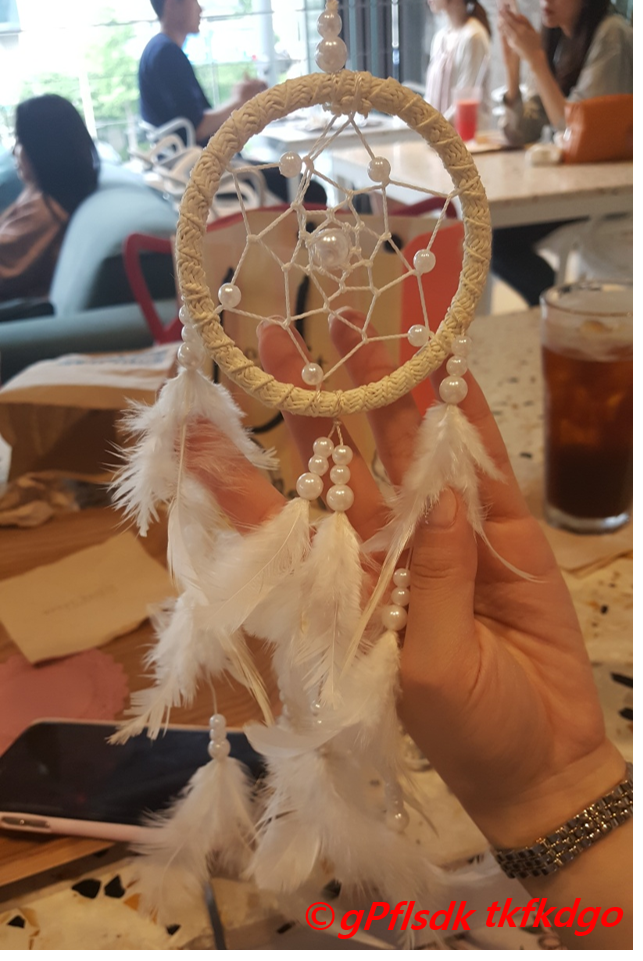 좋은 꿈을 꾸게 해준다는 드림캐처